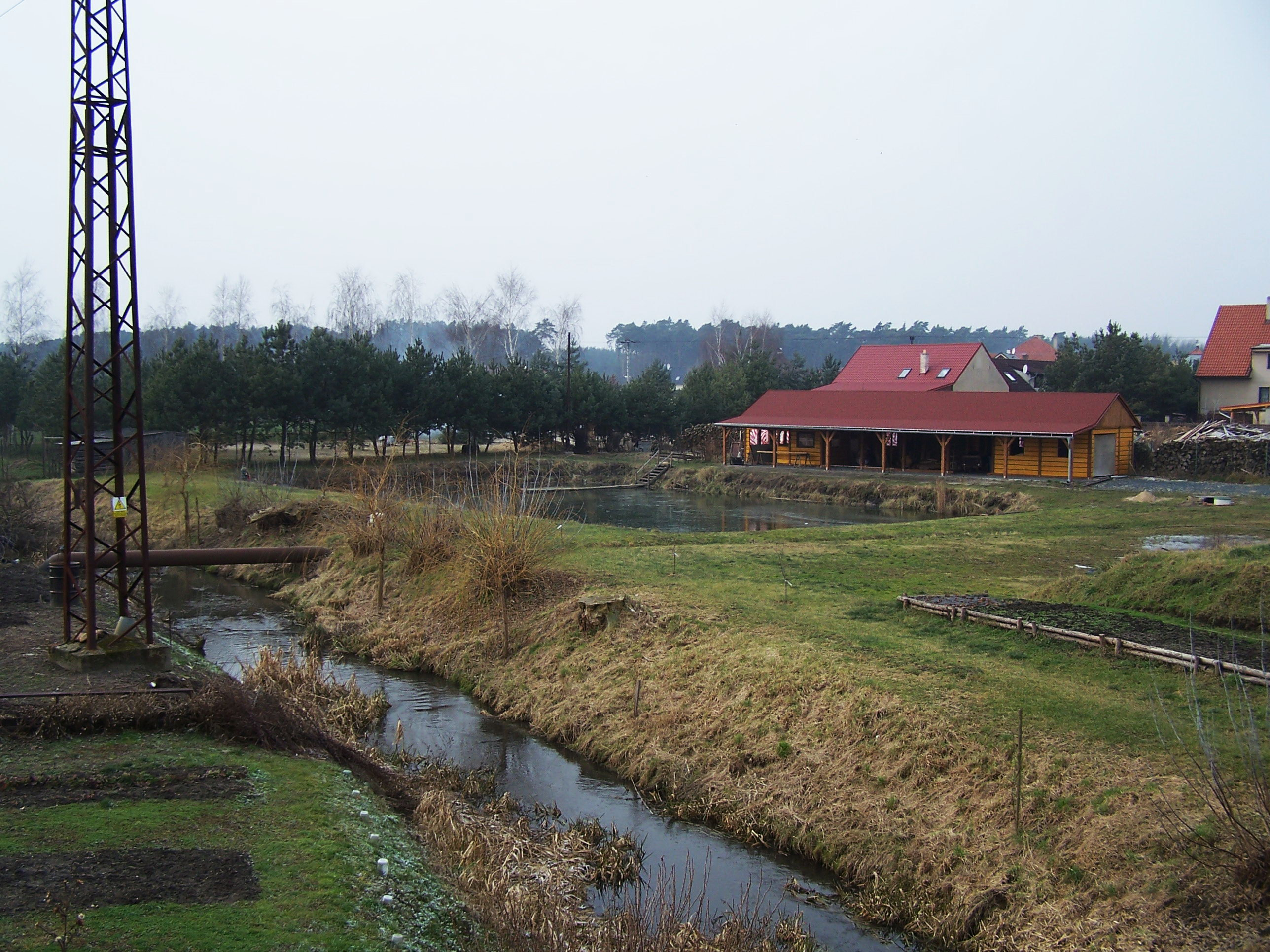 Stará Lysá, potok Mlynařice v obci.